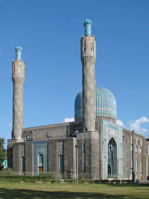 La mosquée de Saint-Pétersbourg Cette mosquée a été construite à Saint-Pétersbourg entre 1910 et 1914 sur le modèle du Gour Emir. Ce bâtiment, tout a fait étonnant dans le contexte urbain de Saint-Pétersbourg, intègre des éléments d'architecture et des décors islamiques traditionnels et des éléments art nouveau. Les architectes sont Vassiliev et Kretchinski. voir le site